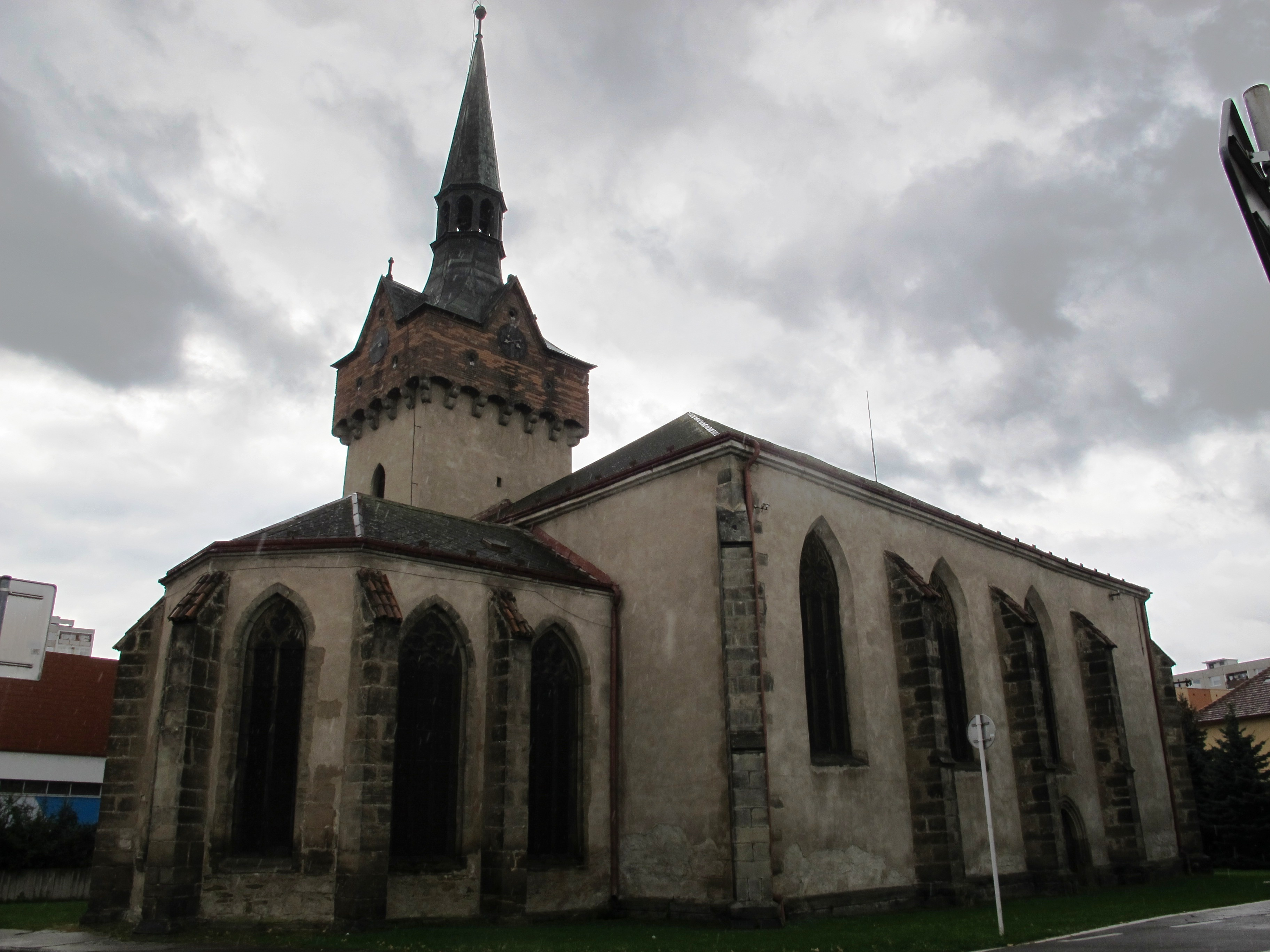 Kostel Sv. Kateřiny v Chrudimi